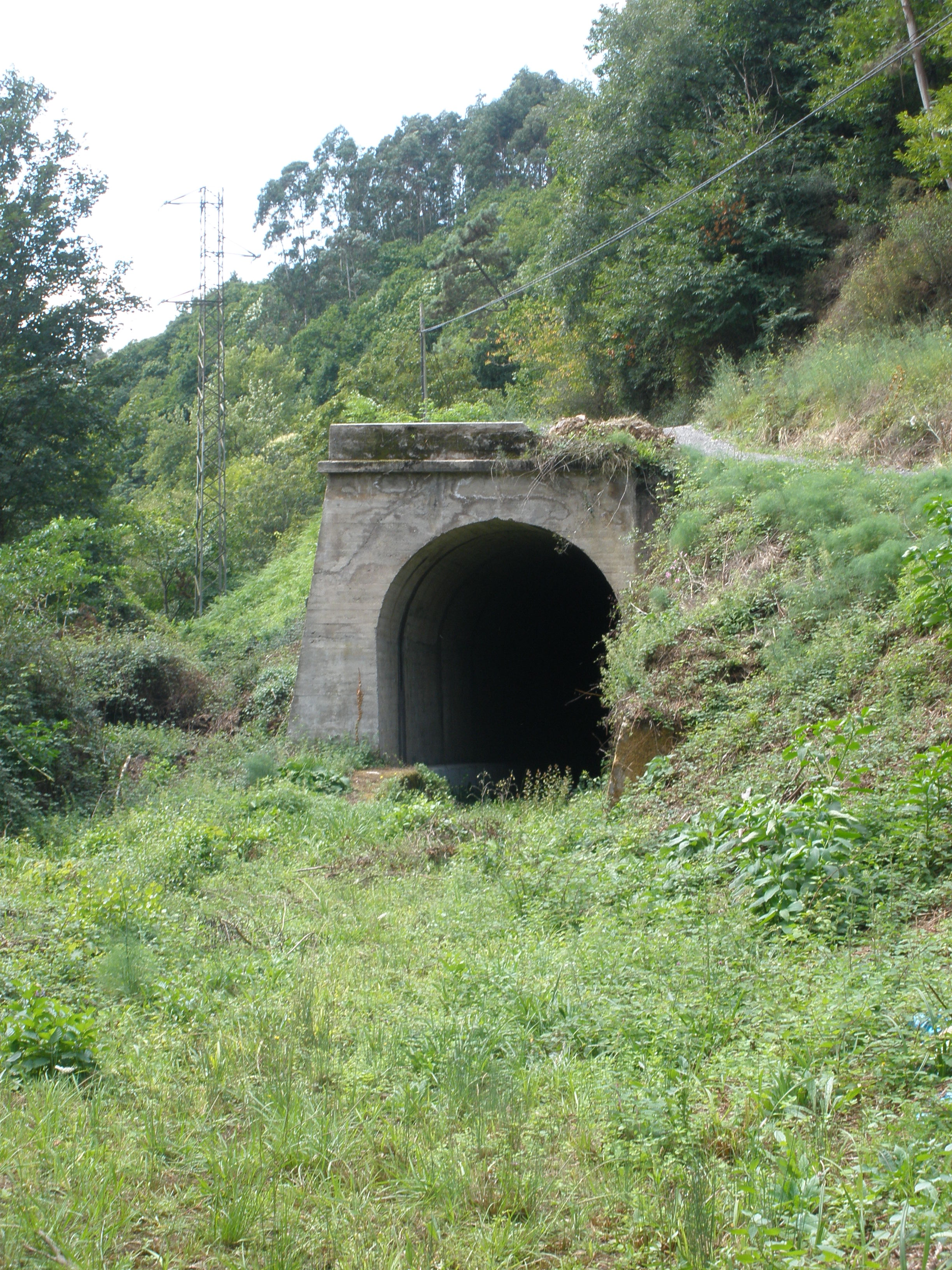 Uno de los túneles del malogrado trazado ferroviario Pravia-Villablino, entre Luerces y Cornellana.